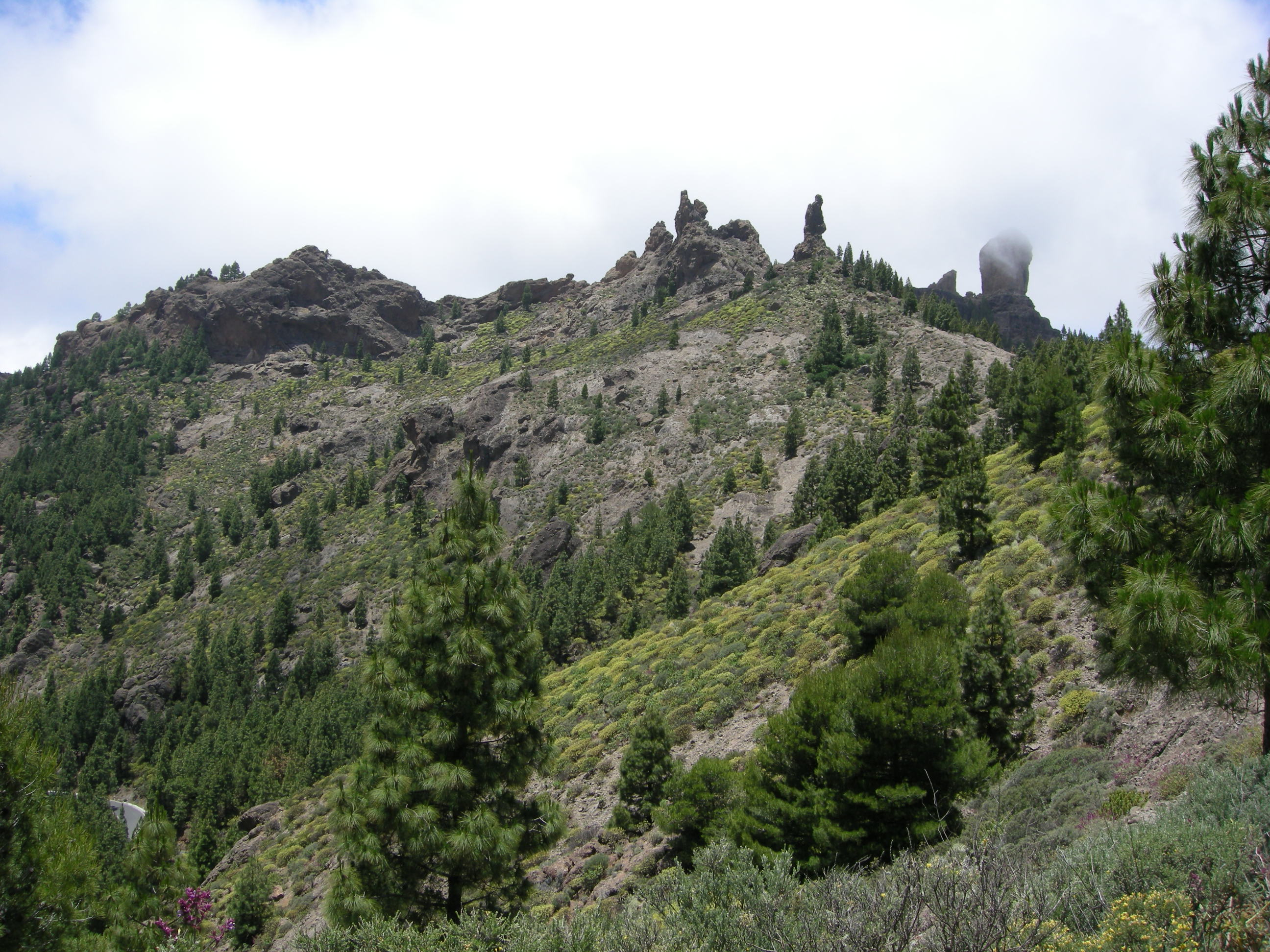 Roque nublo